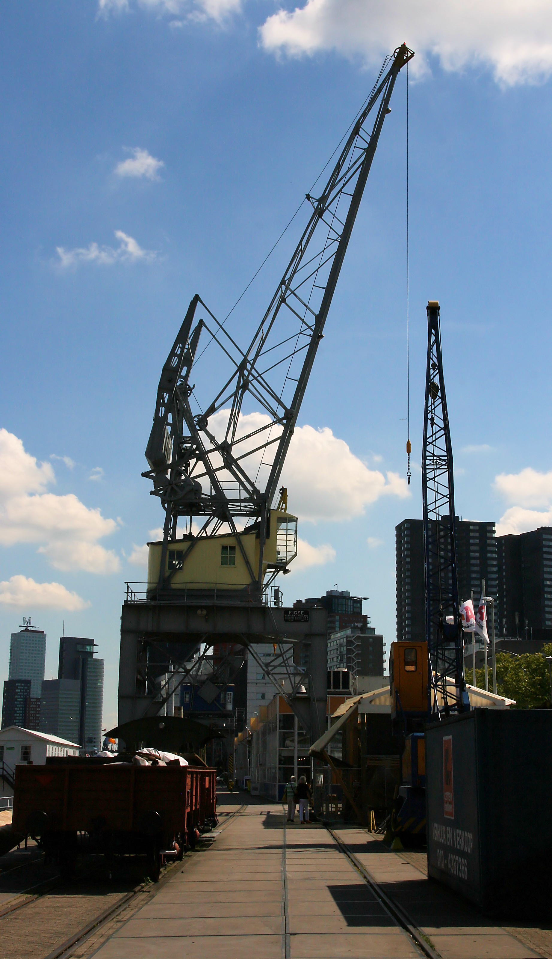 Figee walkraan (1927, nr 01617) Havenmuseum - Figee walkraan (1927)